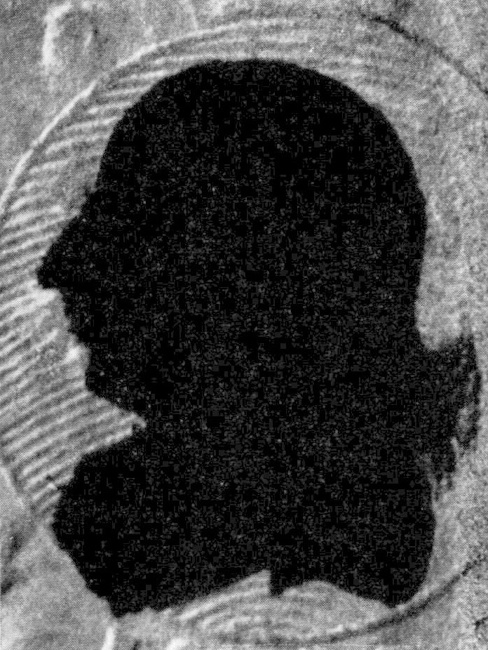 Swedish jurist Per Georg Fahnehielm (1735-1816)